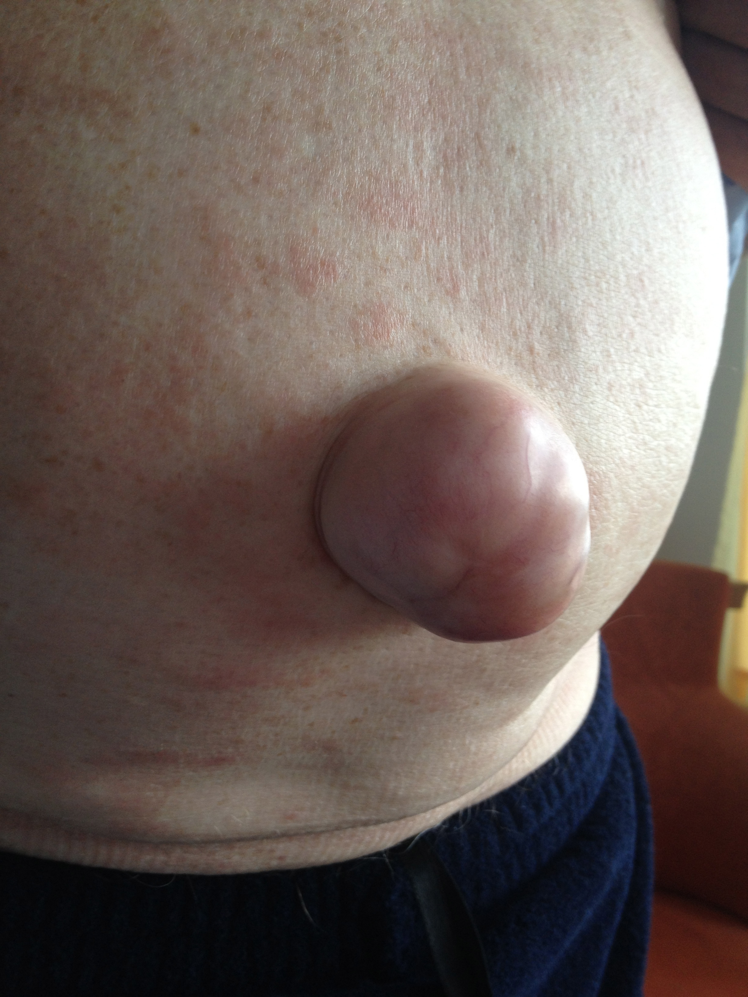 Umbilical Hernia